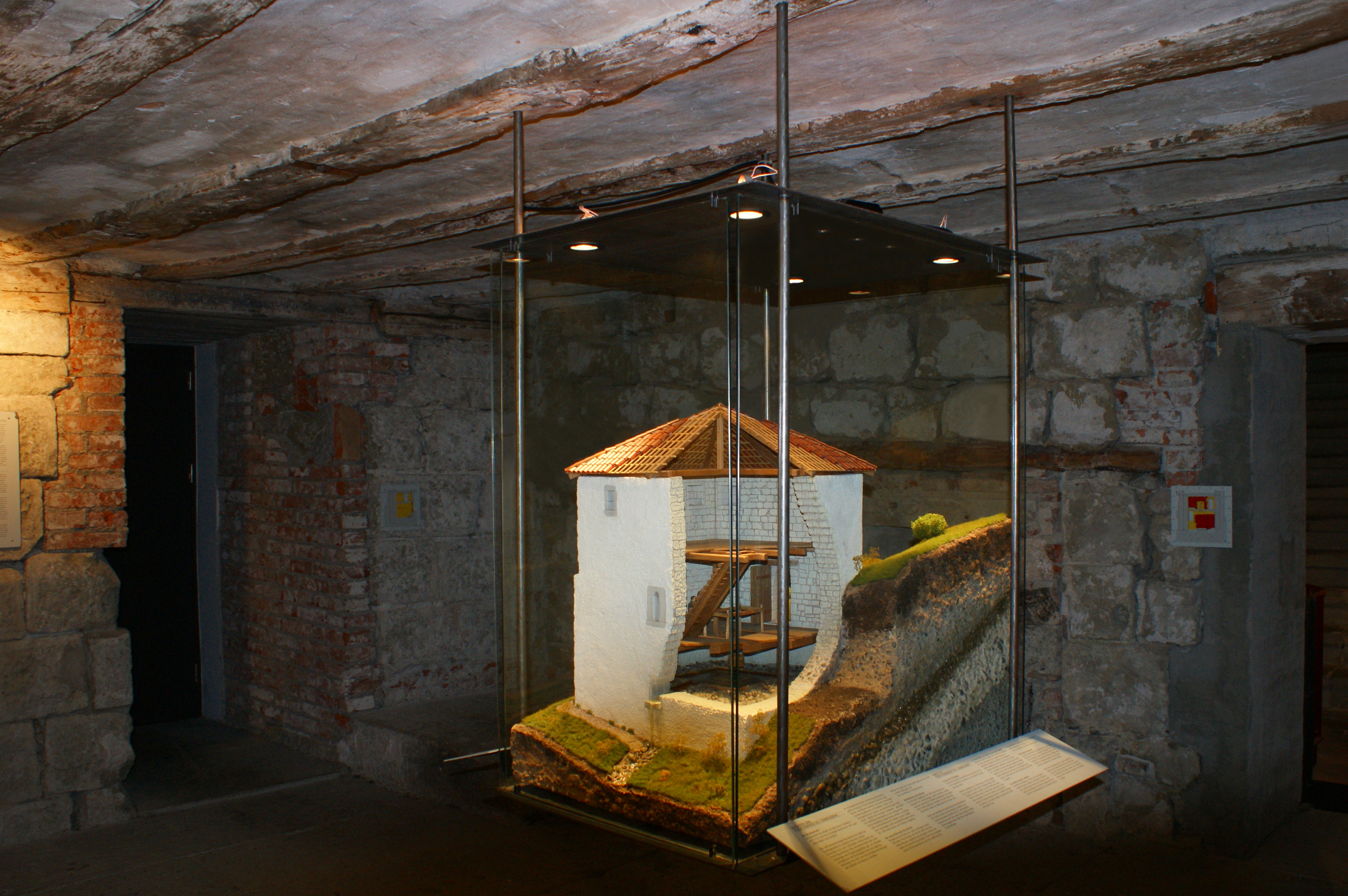 Lenbrunnen Modell im Lenbrunnen Showroom